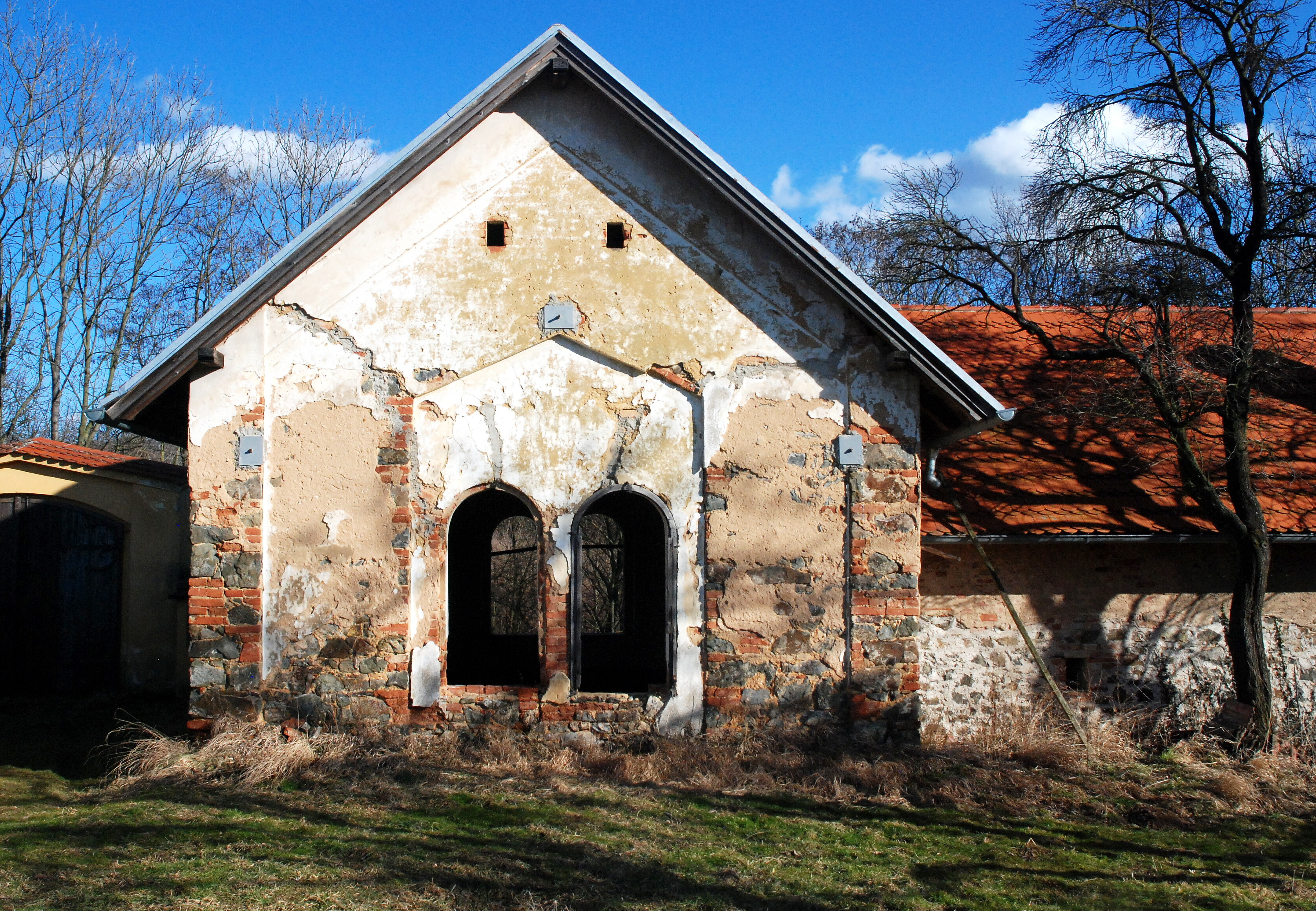 Židovský hřbitov v Litni Project: Židovské památky.